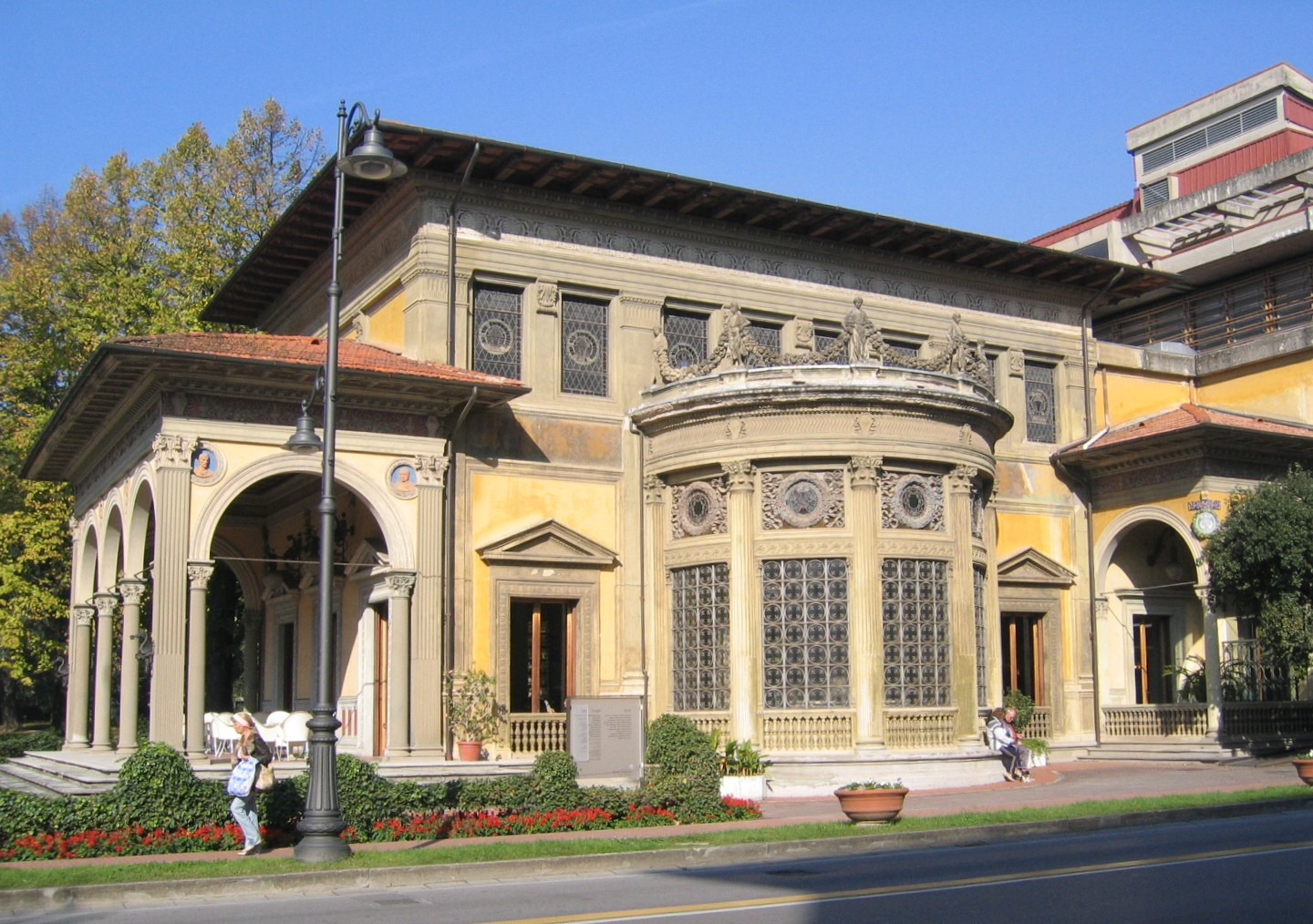 Montecatini Terme, Stabilimento Excelsior